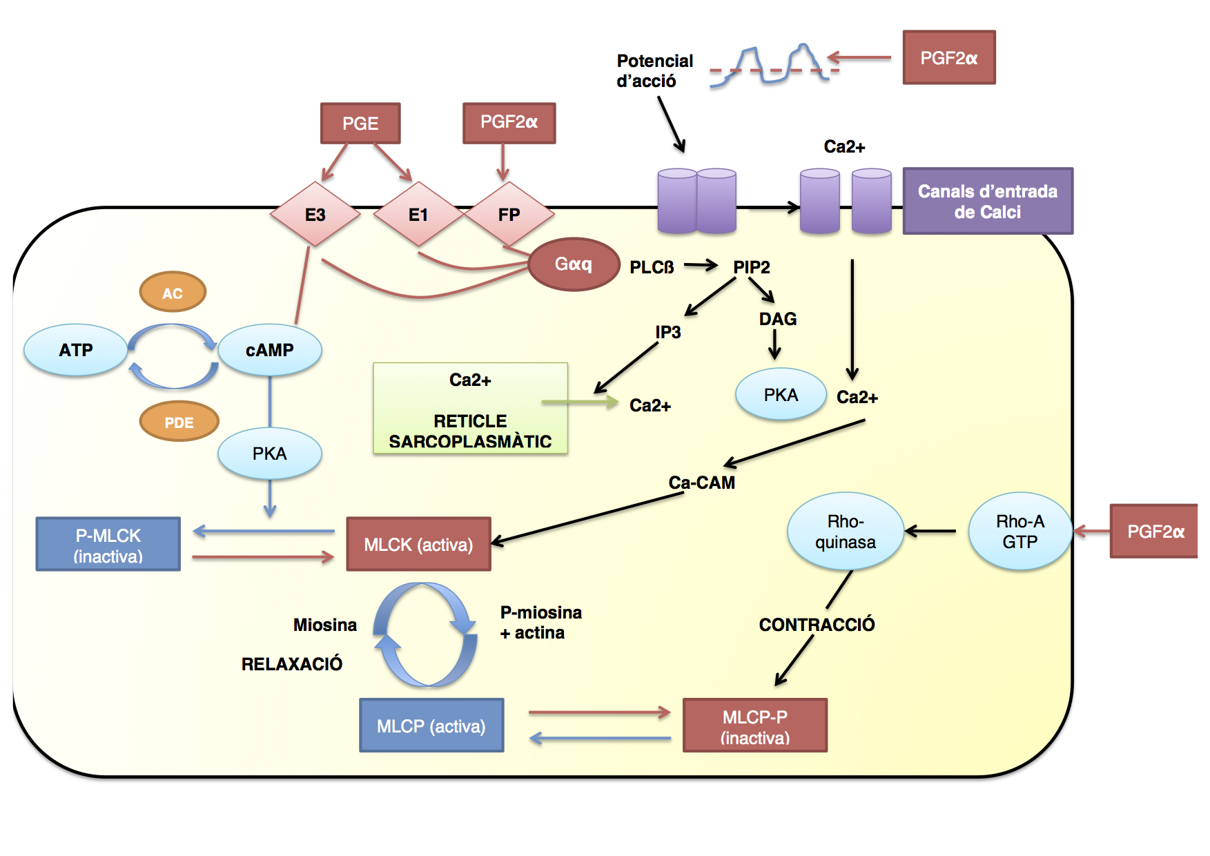 L'esquema explica el procés que desencadena l'acció de les prostaglandines en la contracció i la dilatació del miometri